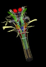 Laranjaz agertzen diren nukleoak dira.